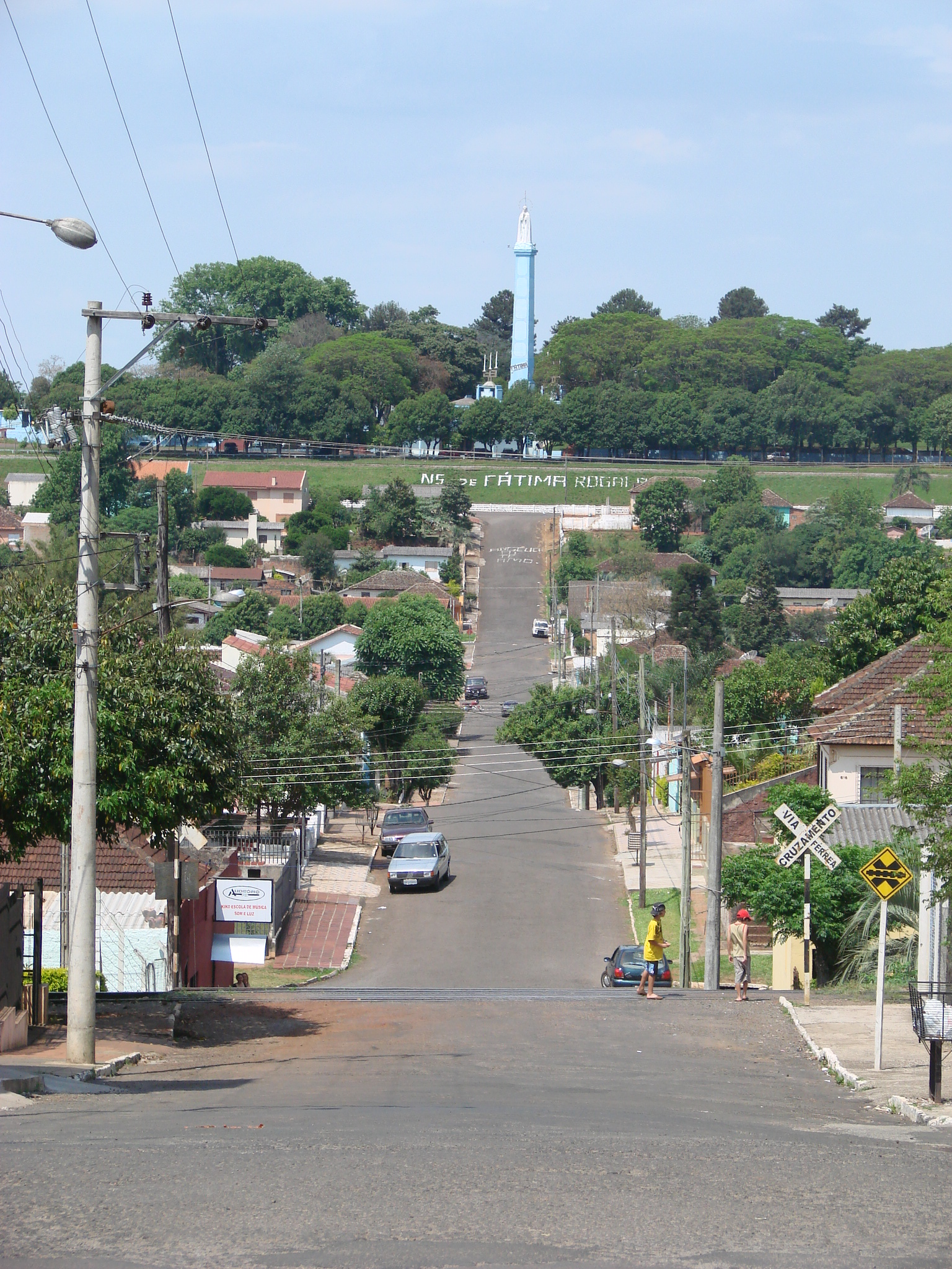 Monumento de Nossa Senhora de Fátima, visto da esquina entre as Ruas Coronel Pillar e Voluntários da Pátria.